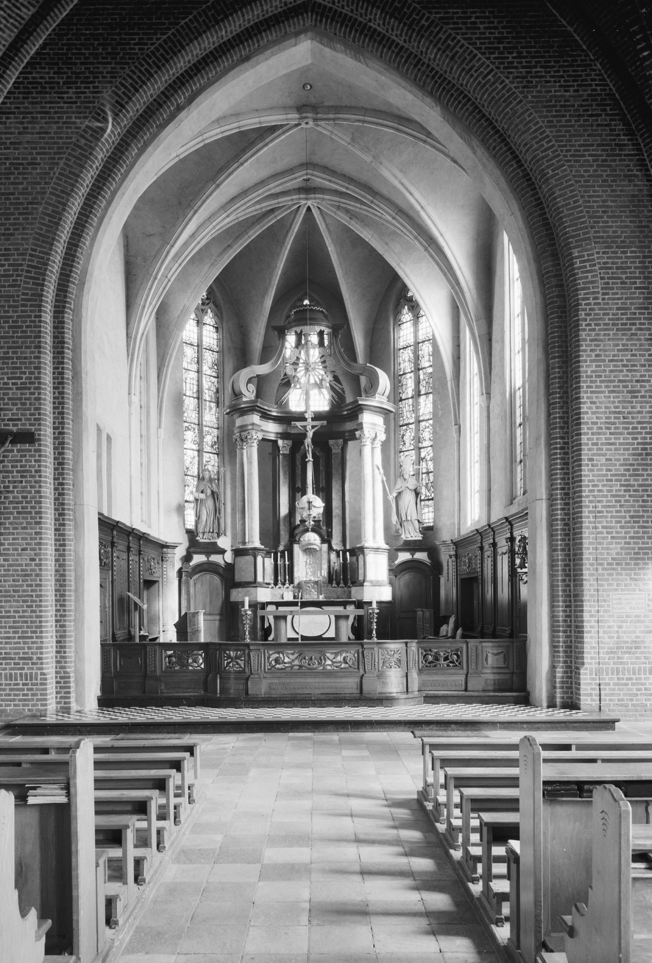 Rooms-Katholieke Kerk: interieur koor